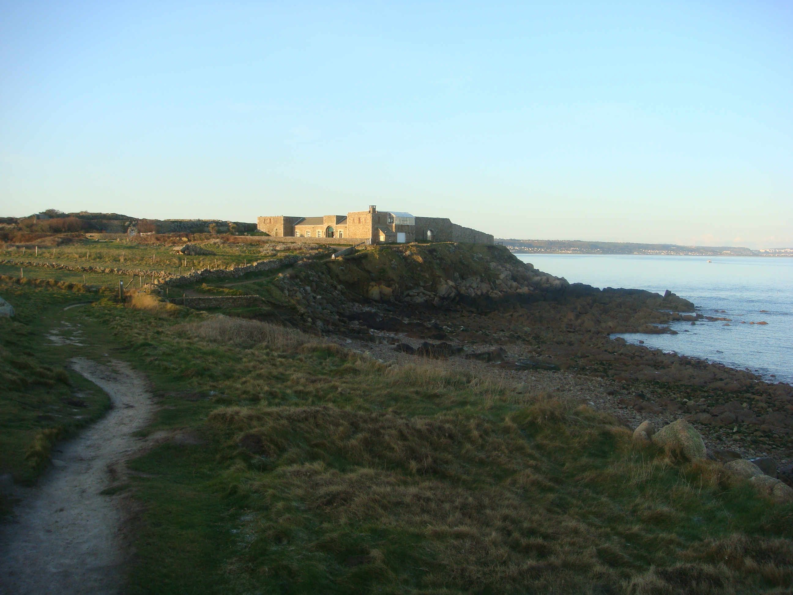 Fort Levi, Manche